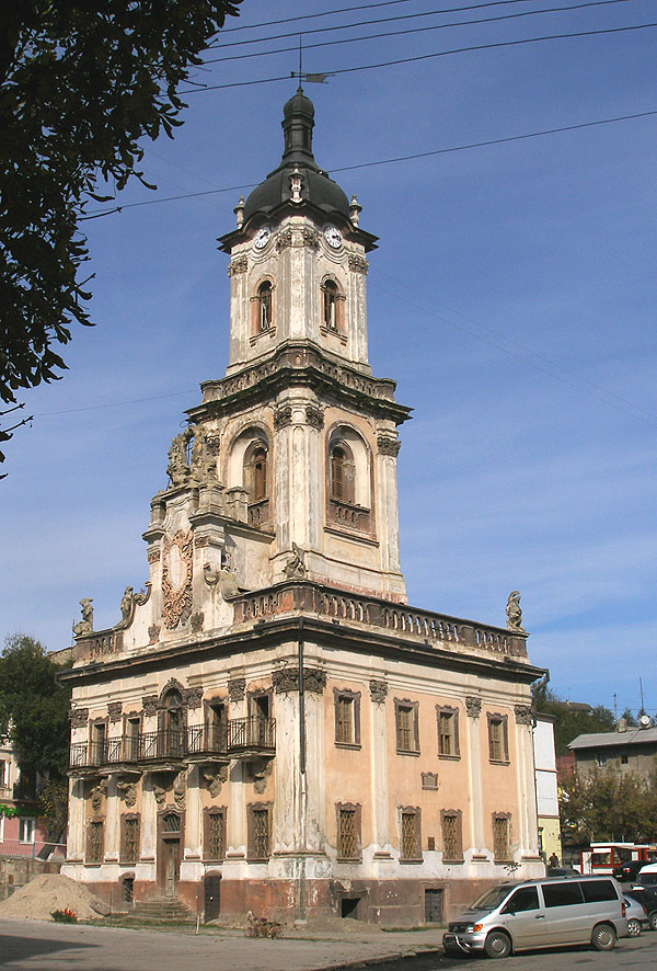 Butschatsch, Rathaus aus dem 18. Jh.